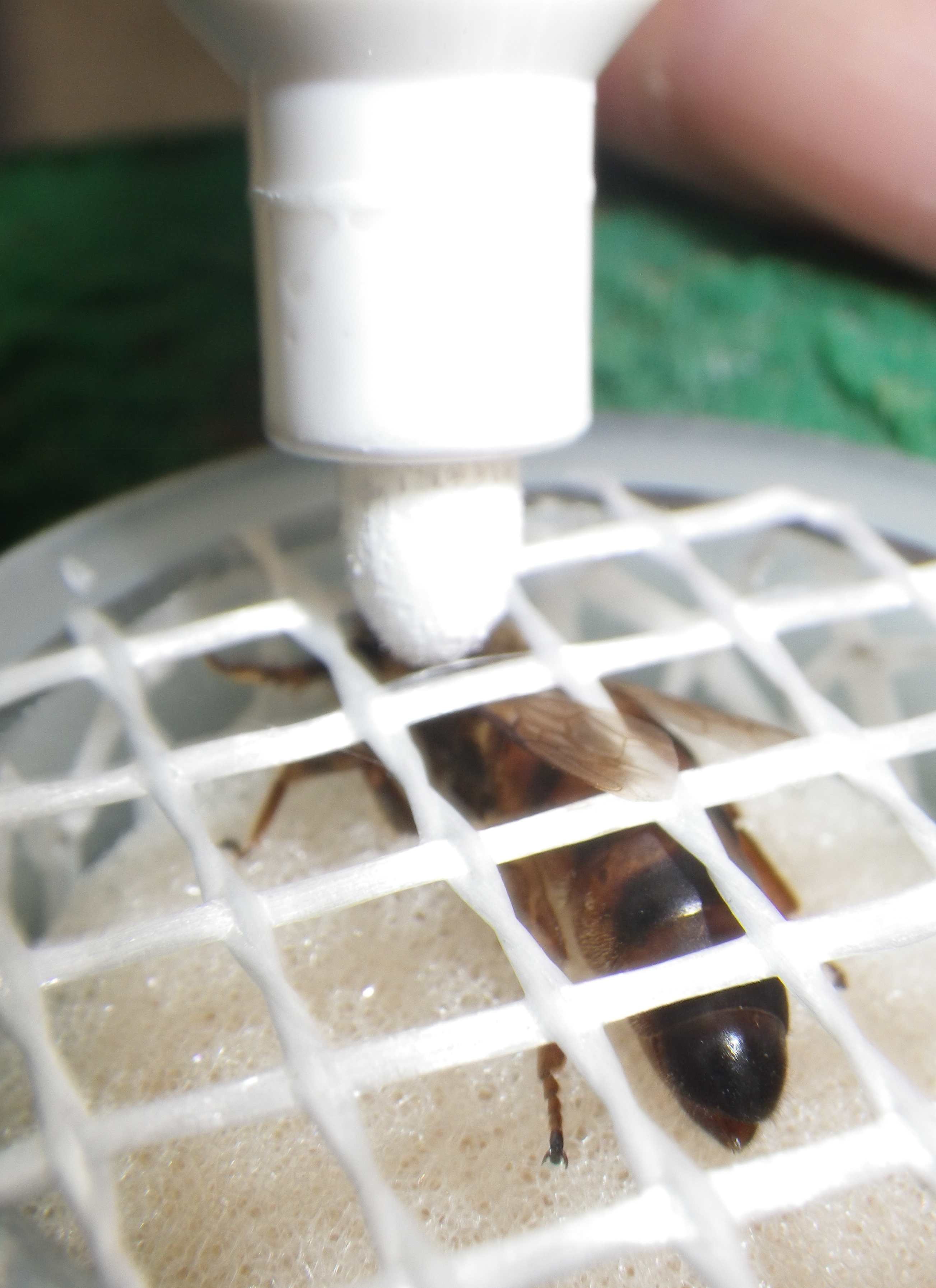 marquage de la reine sur le thorax: le blanc permet de la reconnaître et de connaître son âge : 2011